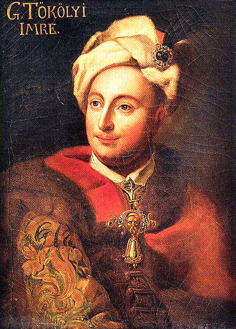 Беларуская (тарашкевіца): Імрэ Тэкэлі